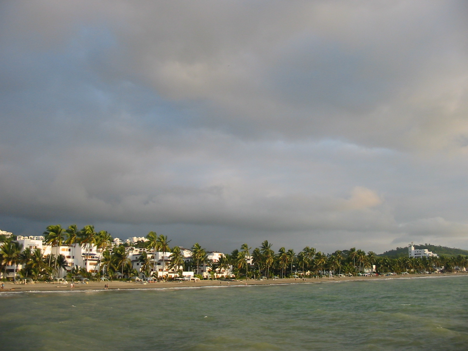 Photographer: Aldo Barba, Quito Date: 04.30.2006 Description: Same Beach. Esmeraldas - Ecuador. Descripción:Playa Same. Esmeraldas - Ecuador.